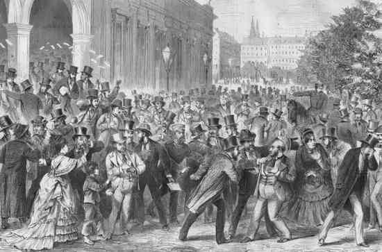 Die Börsenkatastrophe in Wien am 9. Mai 1873, aus: Illustrirte Zeitung Nr. 1564 Leipzig, 21. Juni 1873 Zeichnung DHM, Berlin: ZB 20-60a